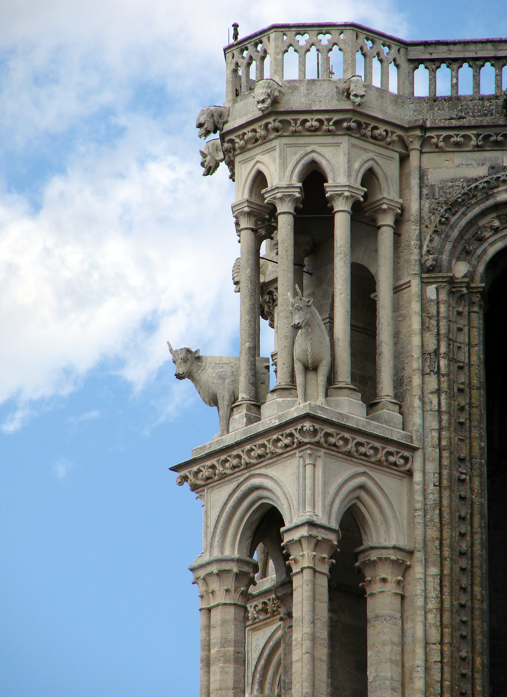 Détail d'une des tours de la cathédrale de Laon, avec les statues de boeufs.